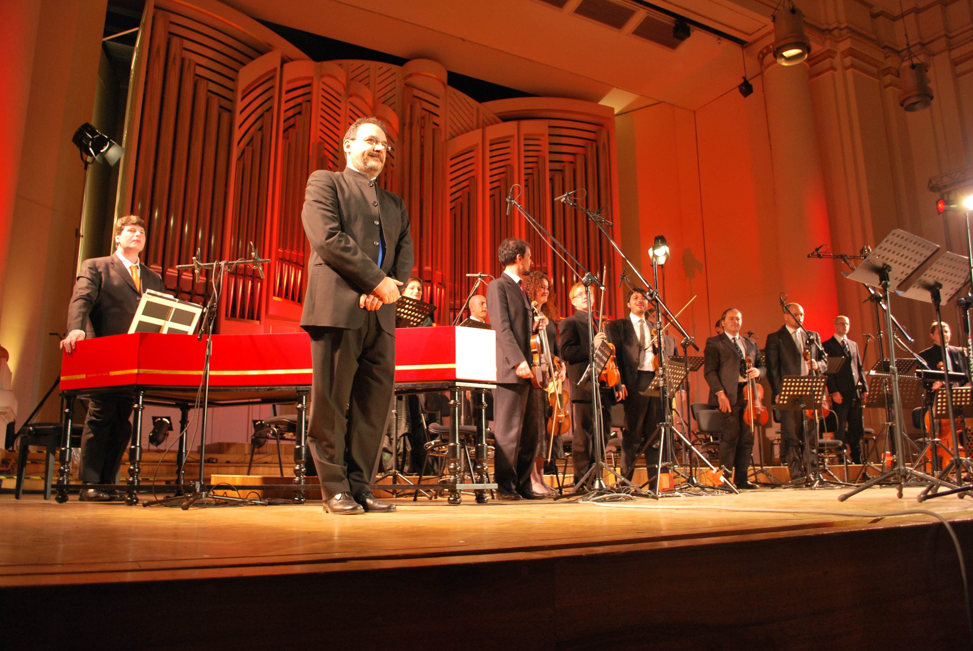 Concerto Italiano podczas koncertu w Filharmonii Krakowskiej w ramach festiwalu Misteria Paschalia, 6 kwietnia 2009. Na pierwszym planie Rinaldo Alessandrini.